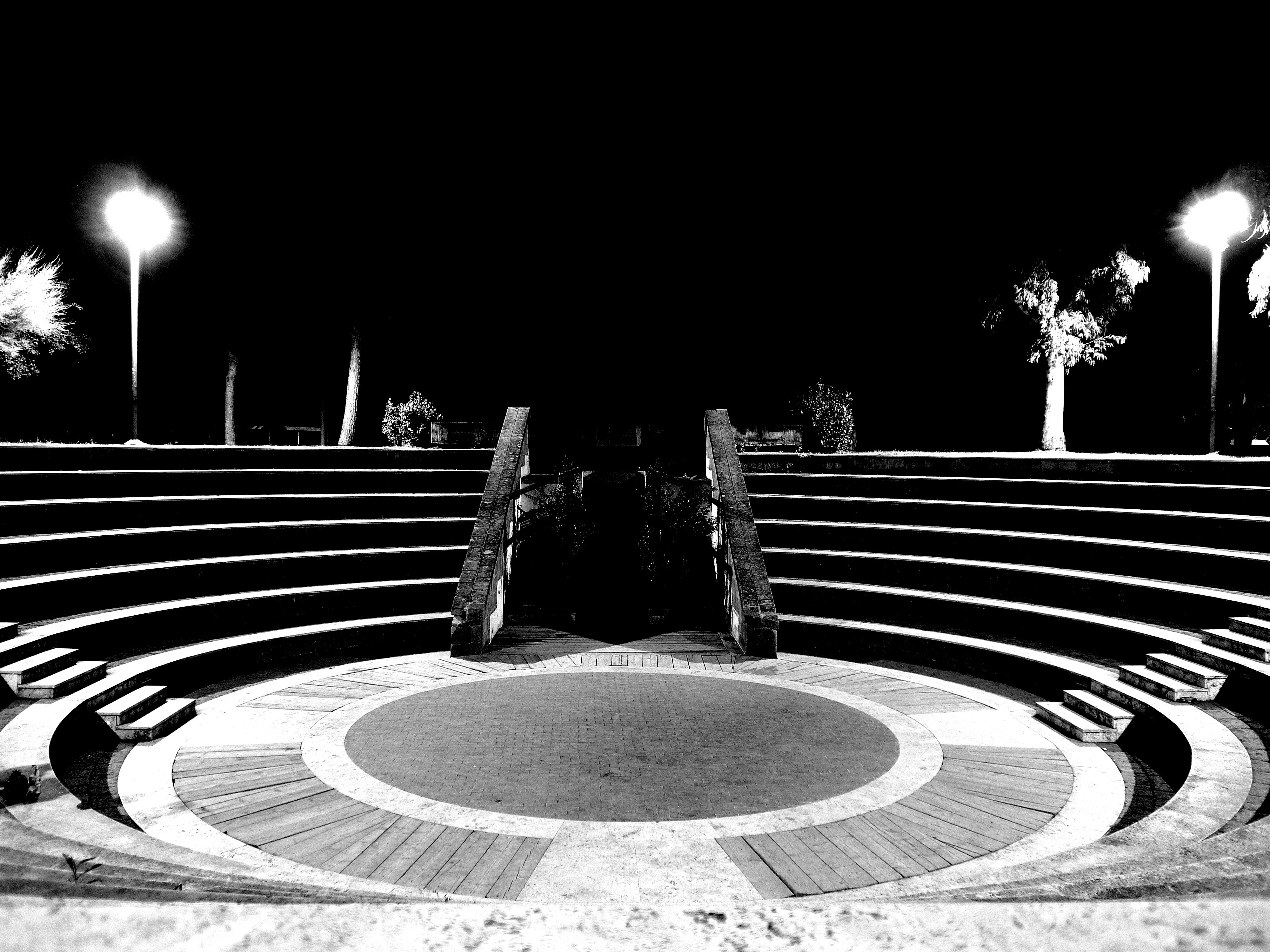 Anfiteatro realizzato all'interno del Parco Virgiliano di Napoli